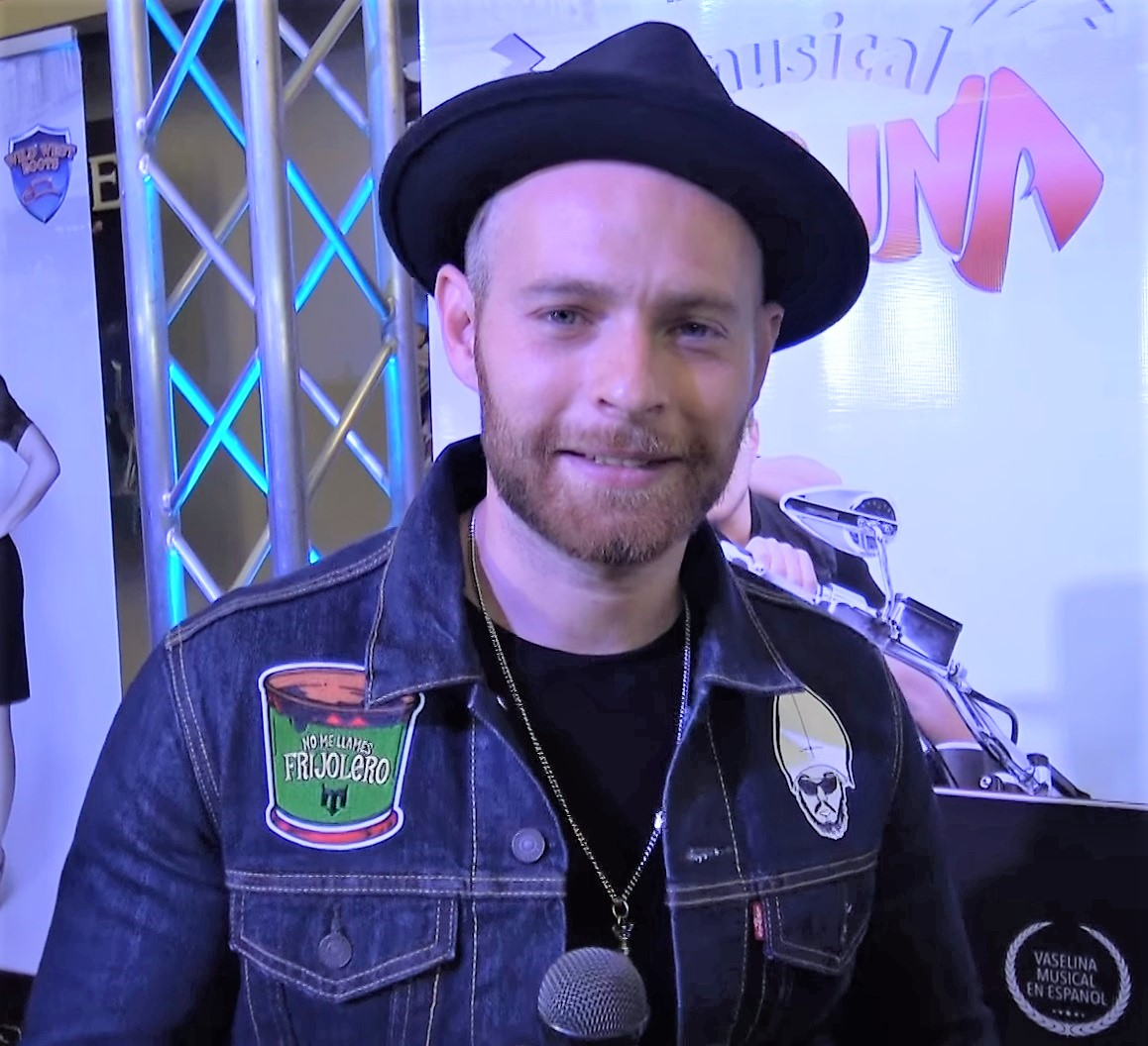 Luis Ernesto Franco nos revela la sorpresa que le tiene a Marimar Vega su esposa by Dulce Osuna